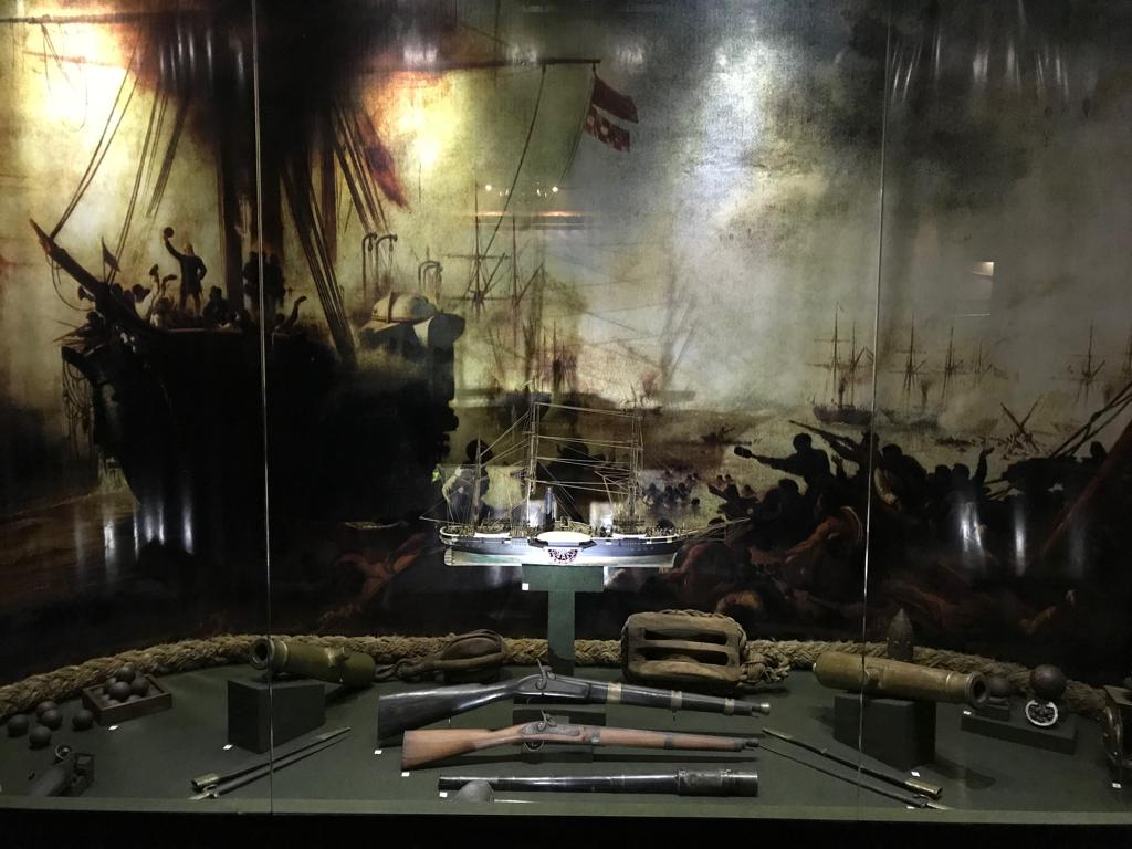 Diorama representando a Batalha do Riachuelo, com destaque para o nautimodelo da Amazonas.